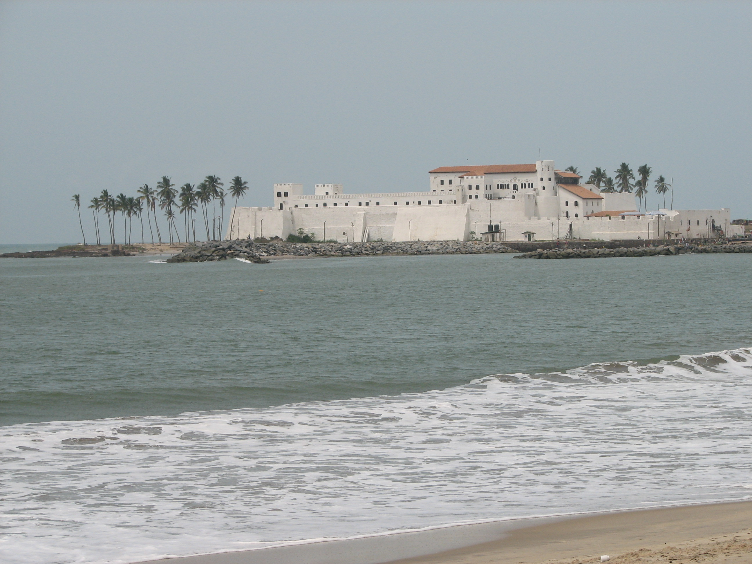 Elmina Slave Castle